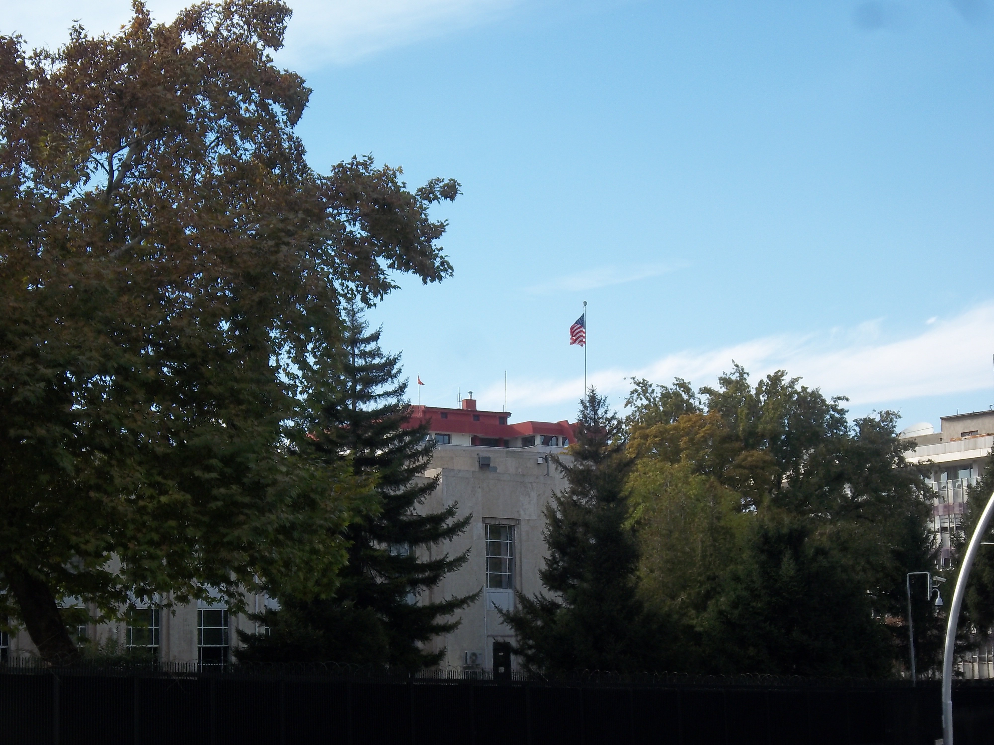 Srpskohrvatski / српскохрватски: Ambasada Sjedinjenih Američkih Država u Ankari.